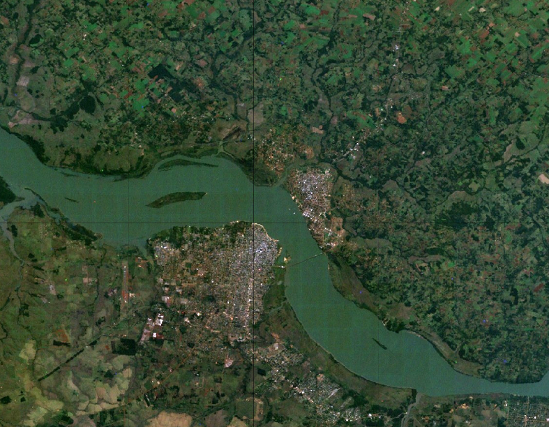 Foto Satelital en donde se observan las ciudades de Posadas (Argentina) y Encarnación (Paraguay). Tomada desde el Programa: WW2D-Earth WW2D 0.99.5 Athor: Vitaliy Pronkin This is a beta version, please report about all found bugs (however I can't reply to everyone). Check project home page at for updates, documentation, etc. Licensed under GPLv2 (General Public License) Categoría:Mapas de América (imagen)